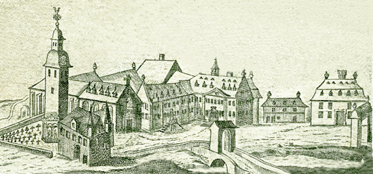 Abtei Sayn 1742, mit den alten Konventsgebäuden, der Porta Nova und den Wirtschaftsgebäuden